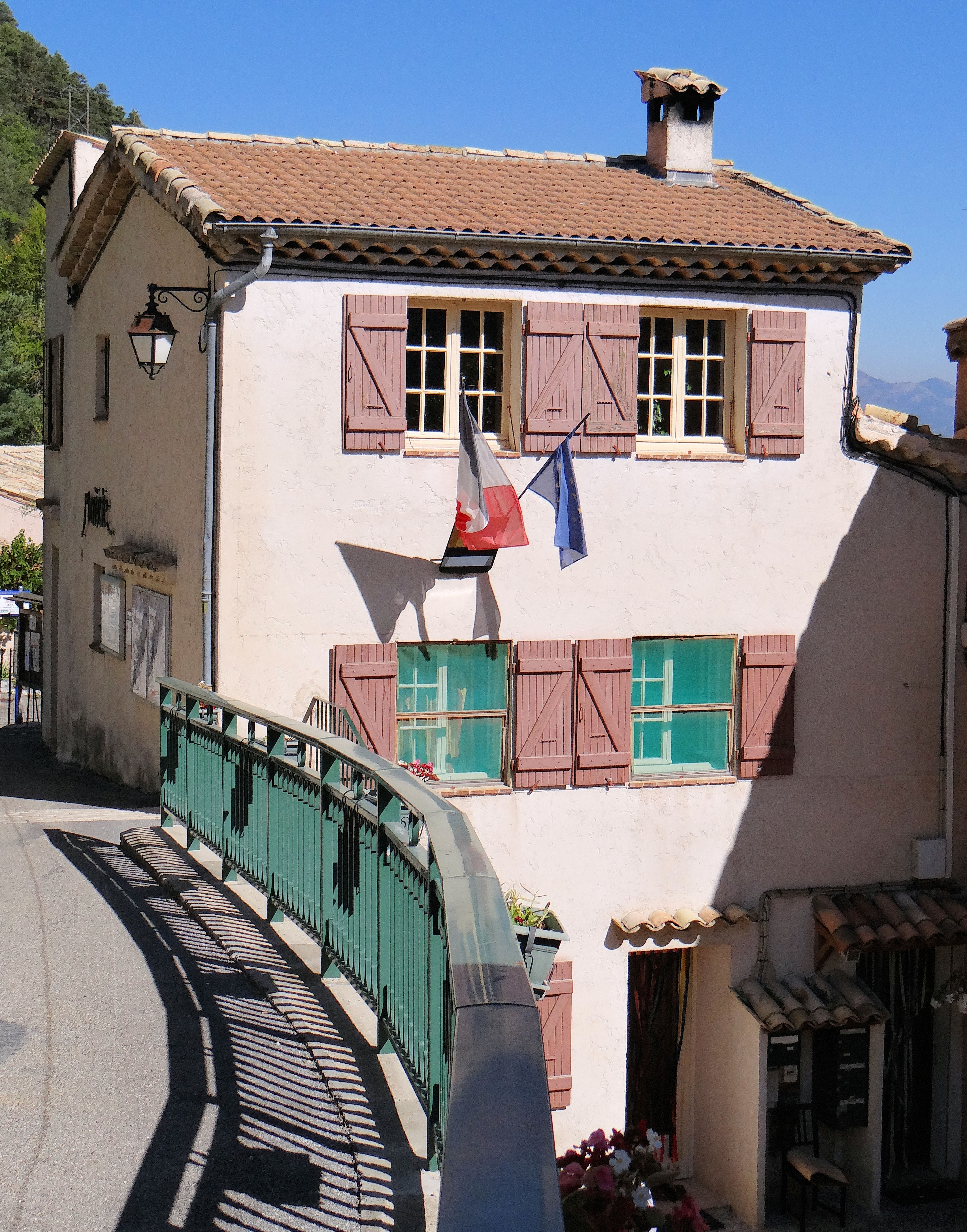 Amirat - La mairie